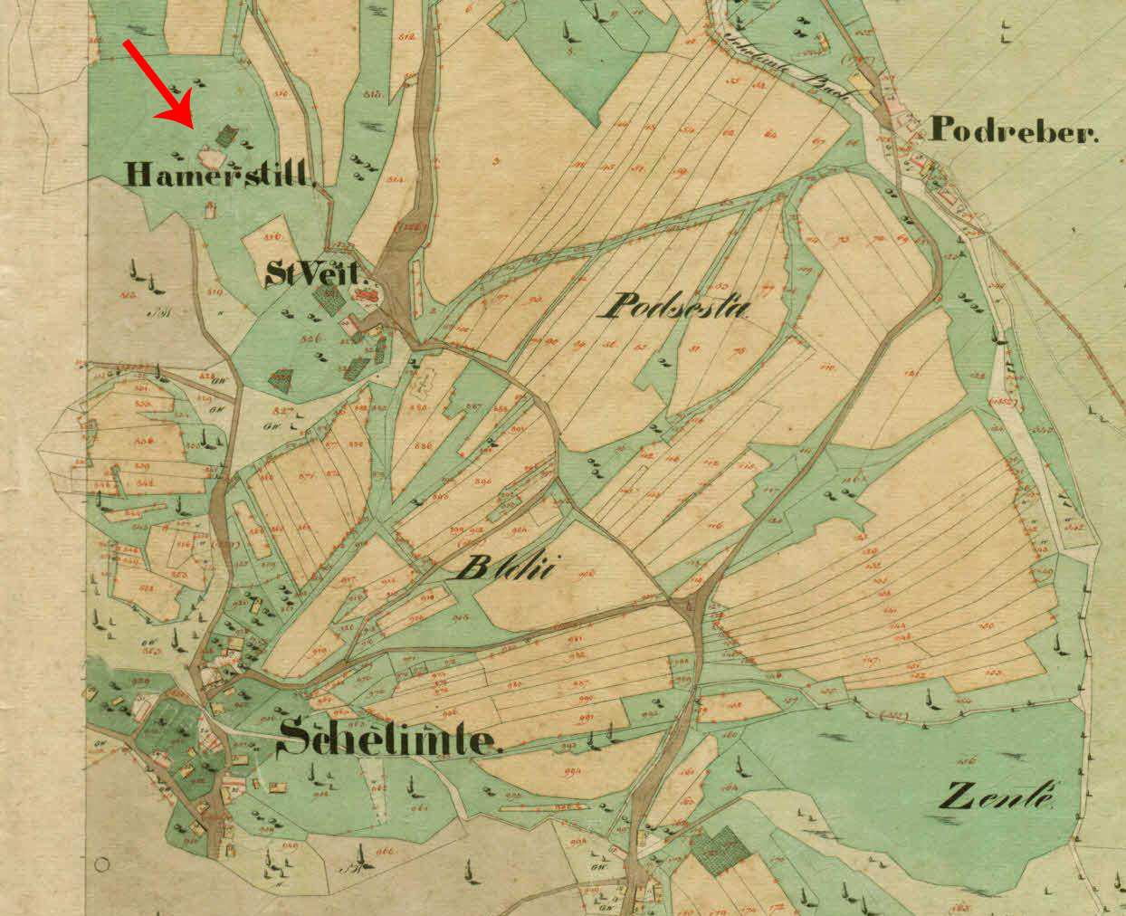 Franciscejski kataster za Kranjsko, 1823-1869